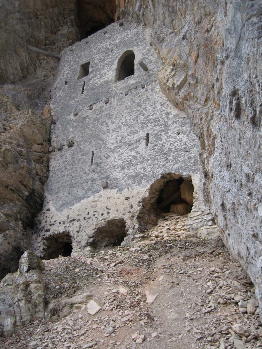 Frontmauer